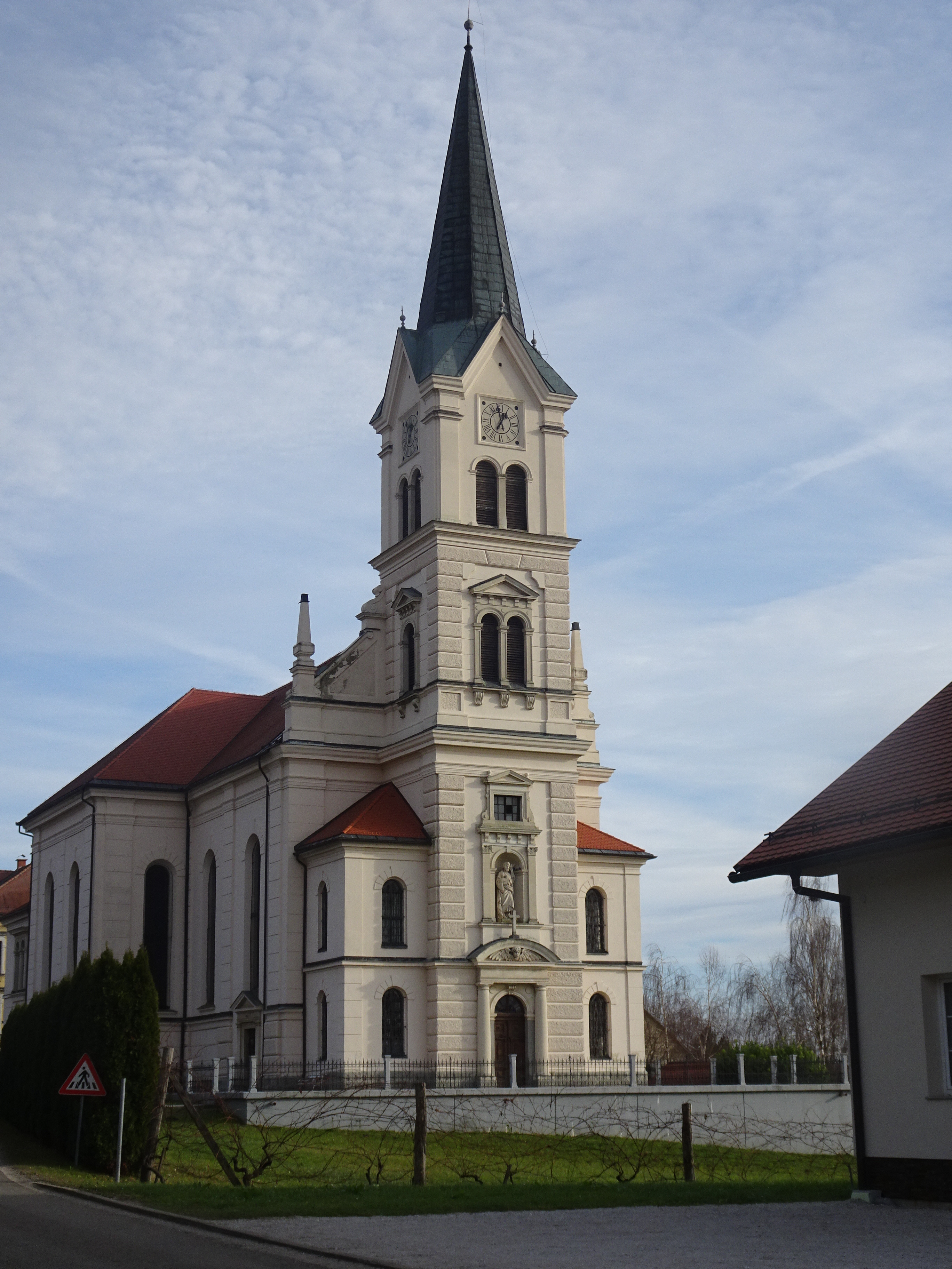 Župnijska cerkev Čadram-Oplotnica